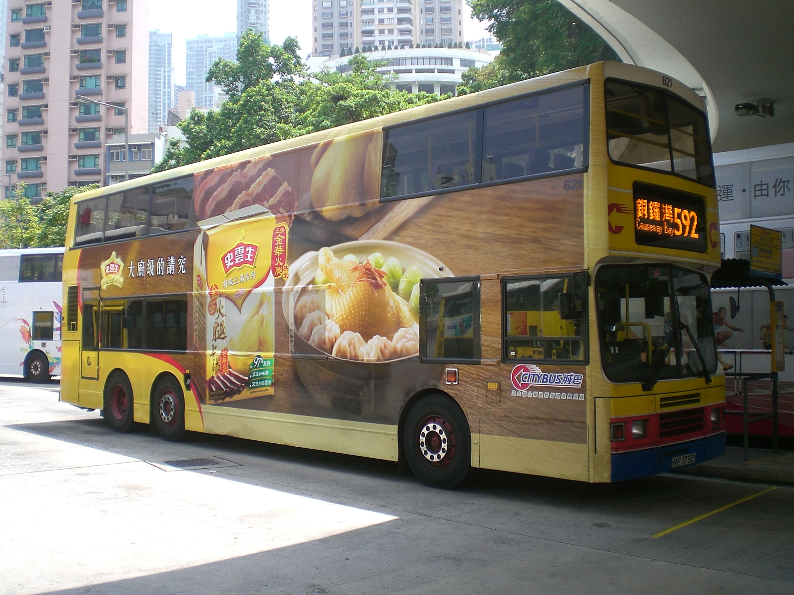 停泊於銅鑼灣（摩頓台）巴士總站的一輛香港城巴富豪奧林比安/亞歷山大R型（621/HF1792），巴士上有金寶湯公司（Campbell Soup）史雲生雞湯（Swanson）廣告